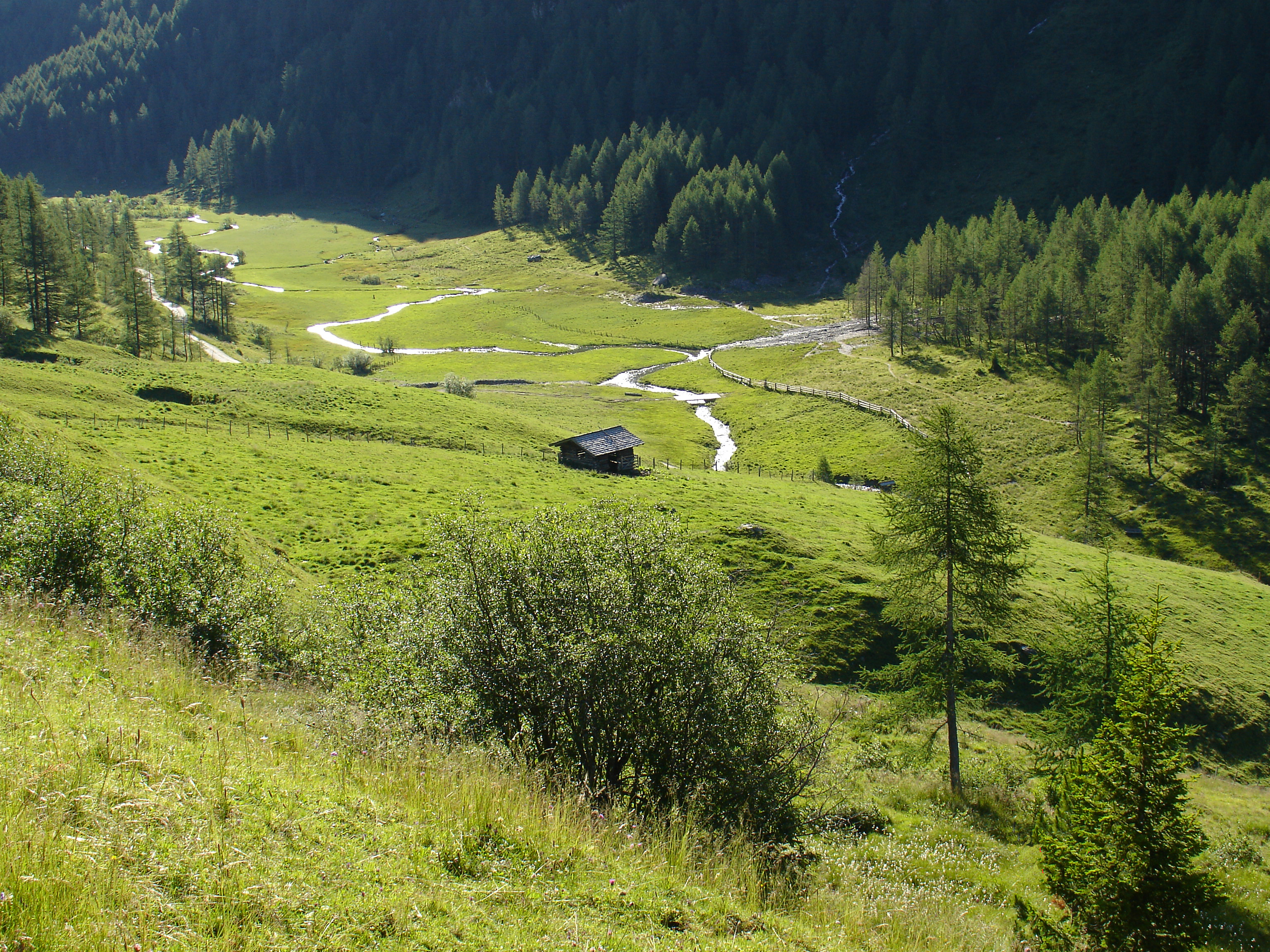 Astner Moos This media shows the natural monument in Carinthia with the ID Sp 27.